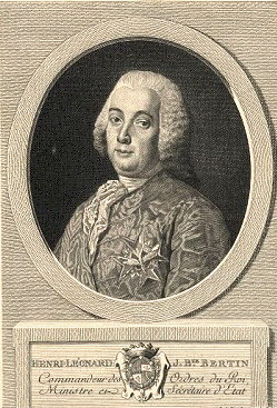 Ministre français des finances Henri Léonard Jean Baptiste Bertin (1719-1792)